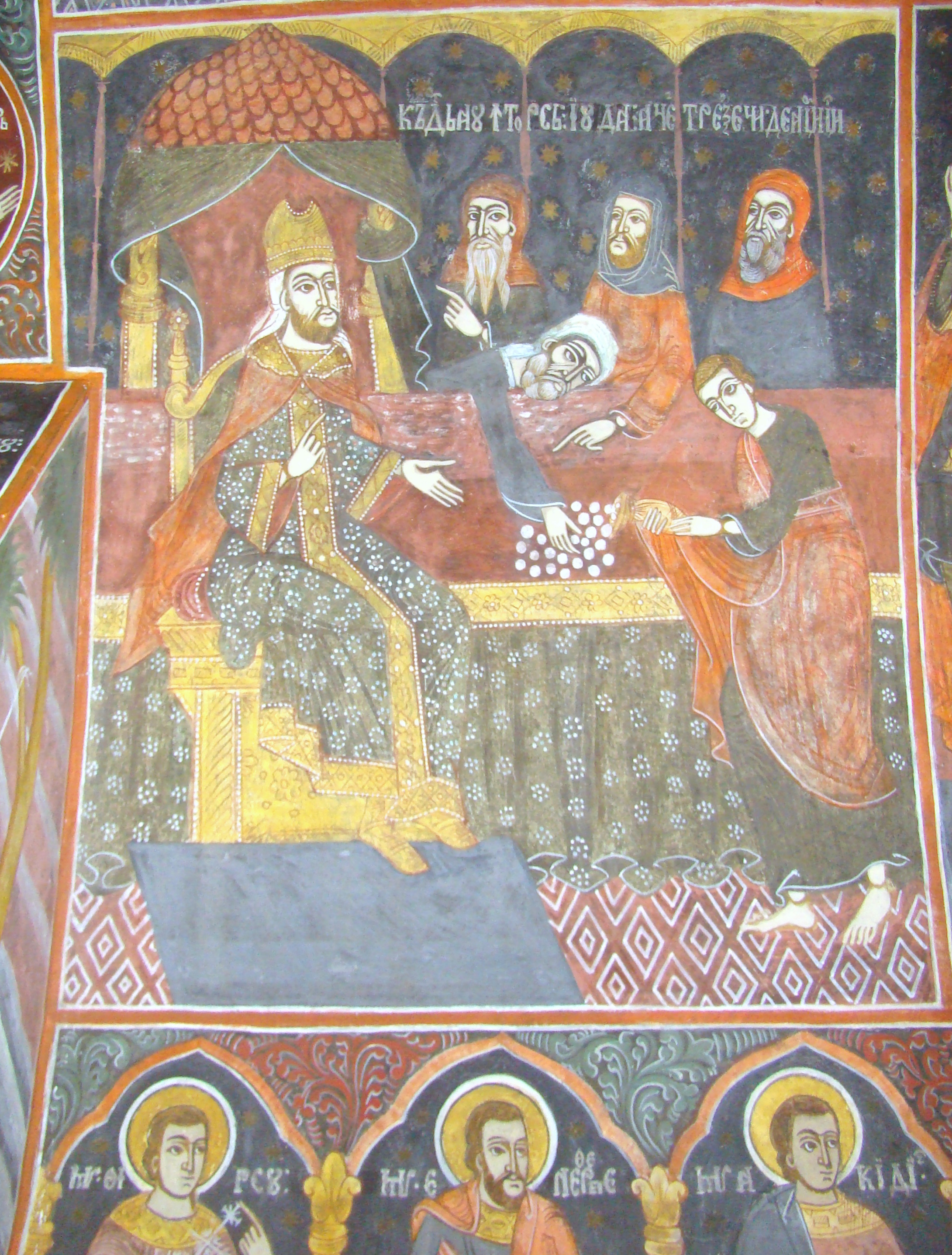 Biserica "Sf. Nicolae" din Mohu, județul Sibiu